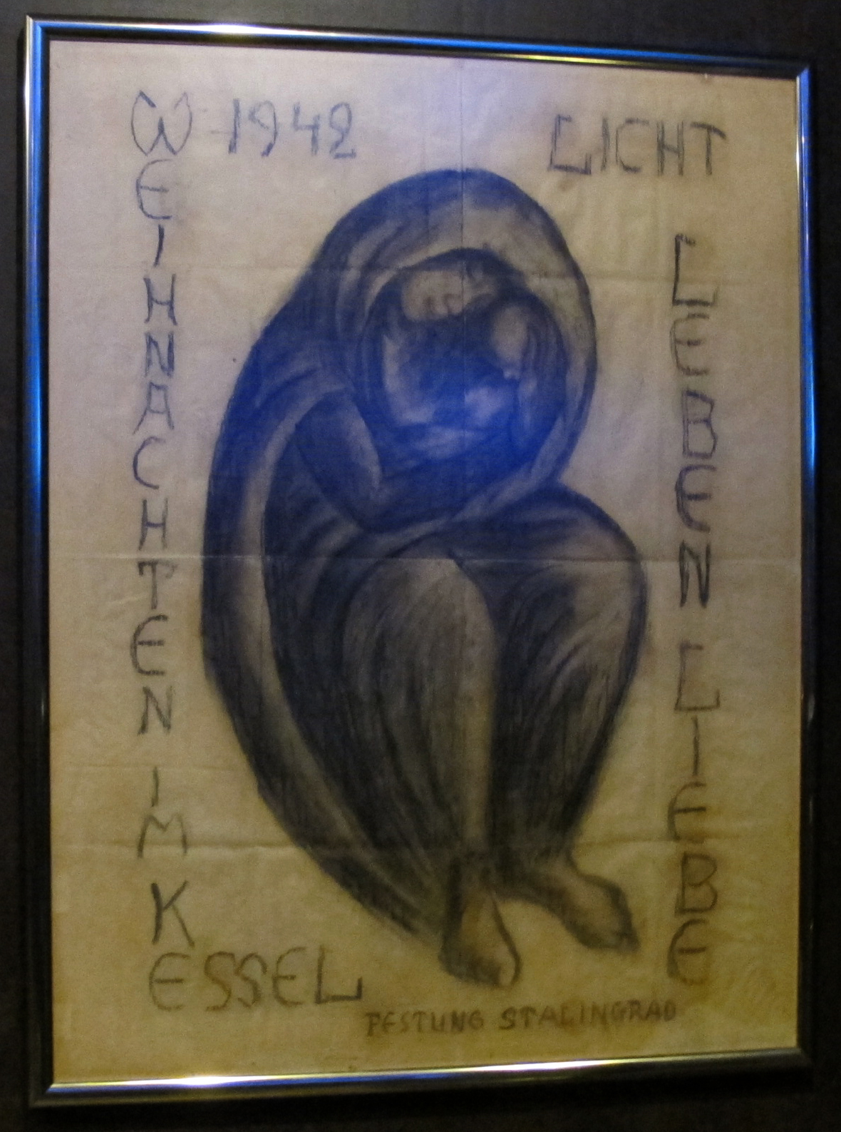 Madonna di stalingrado